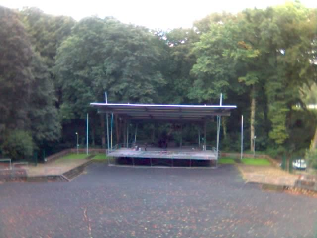 Northeimer Waldbühne (beim Gesundbrunnen)